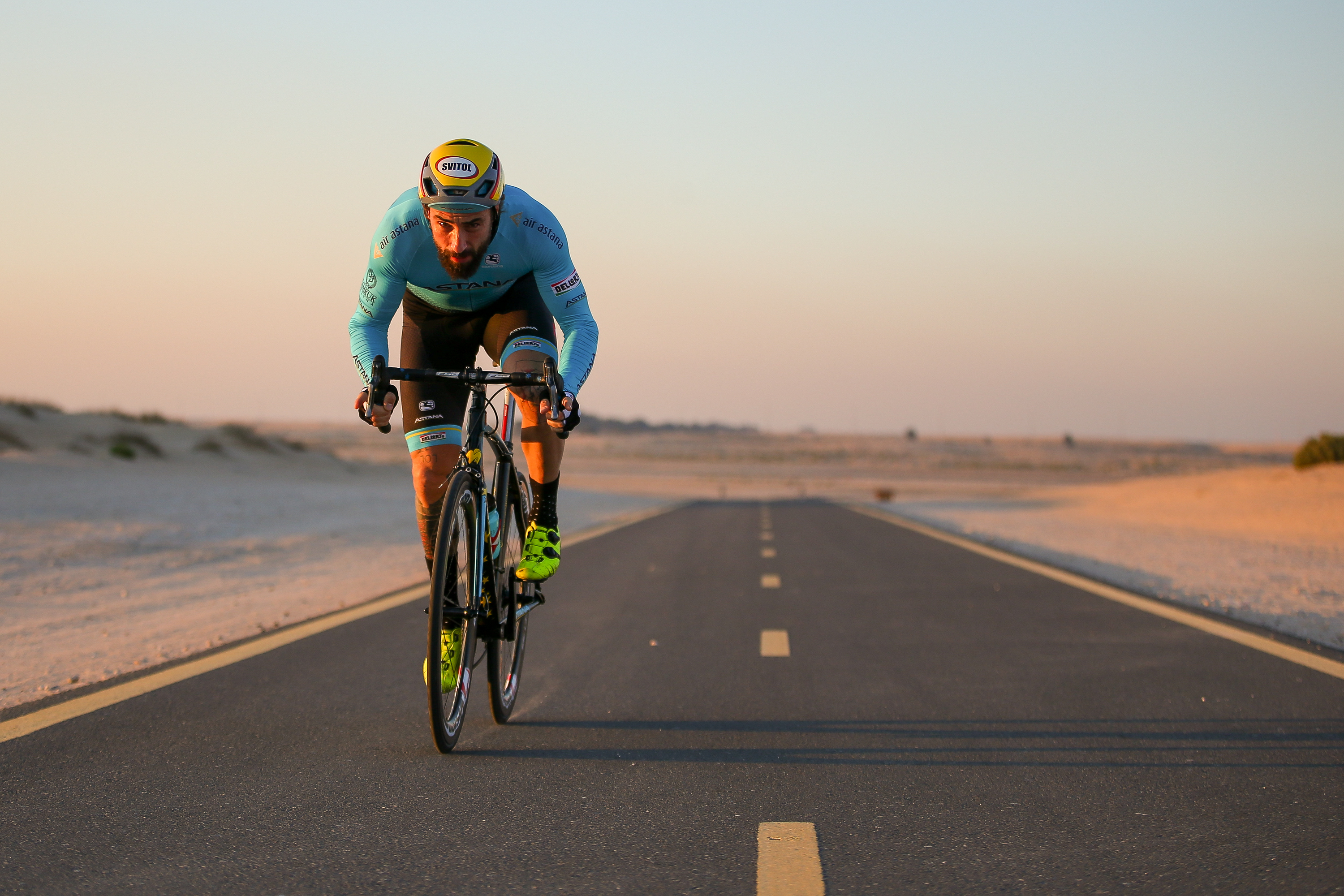 Riding in Dubai